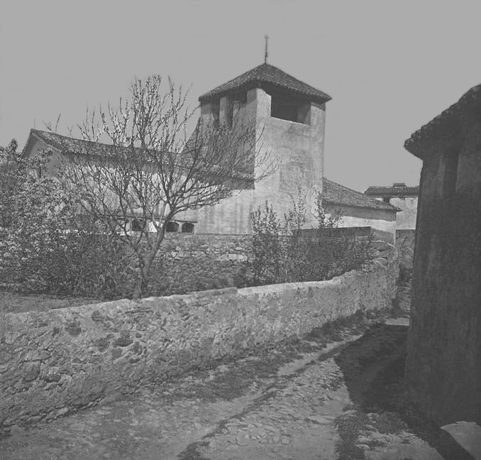 Nova vista d ' una església de Corró d ' Avall. Josep Salvany i Blanch (1924)